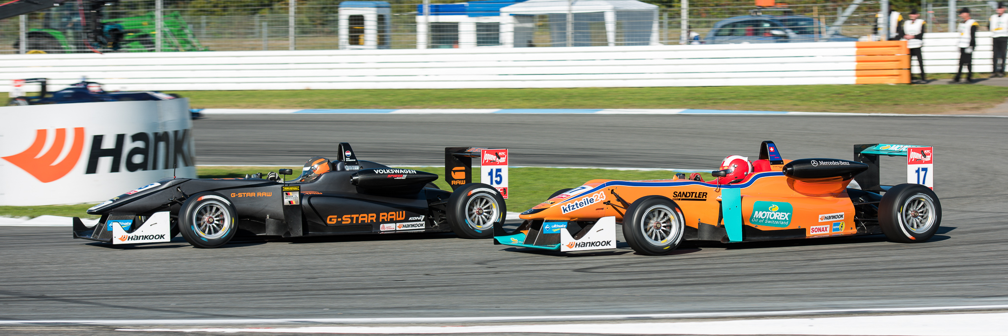 DTM,Dallara F312,Deutsche Tourenwagen Masters,F3 FIA European Championship,FIA Formel 3 Europameisterschaft,Hockenheimring,Jo Zeller Racing,Jules Szymkowiak,Mercedes-Benz,Motorsport,Sandro Zeller,Van Amersfoort Racing,Volkswagen